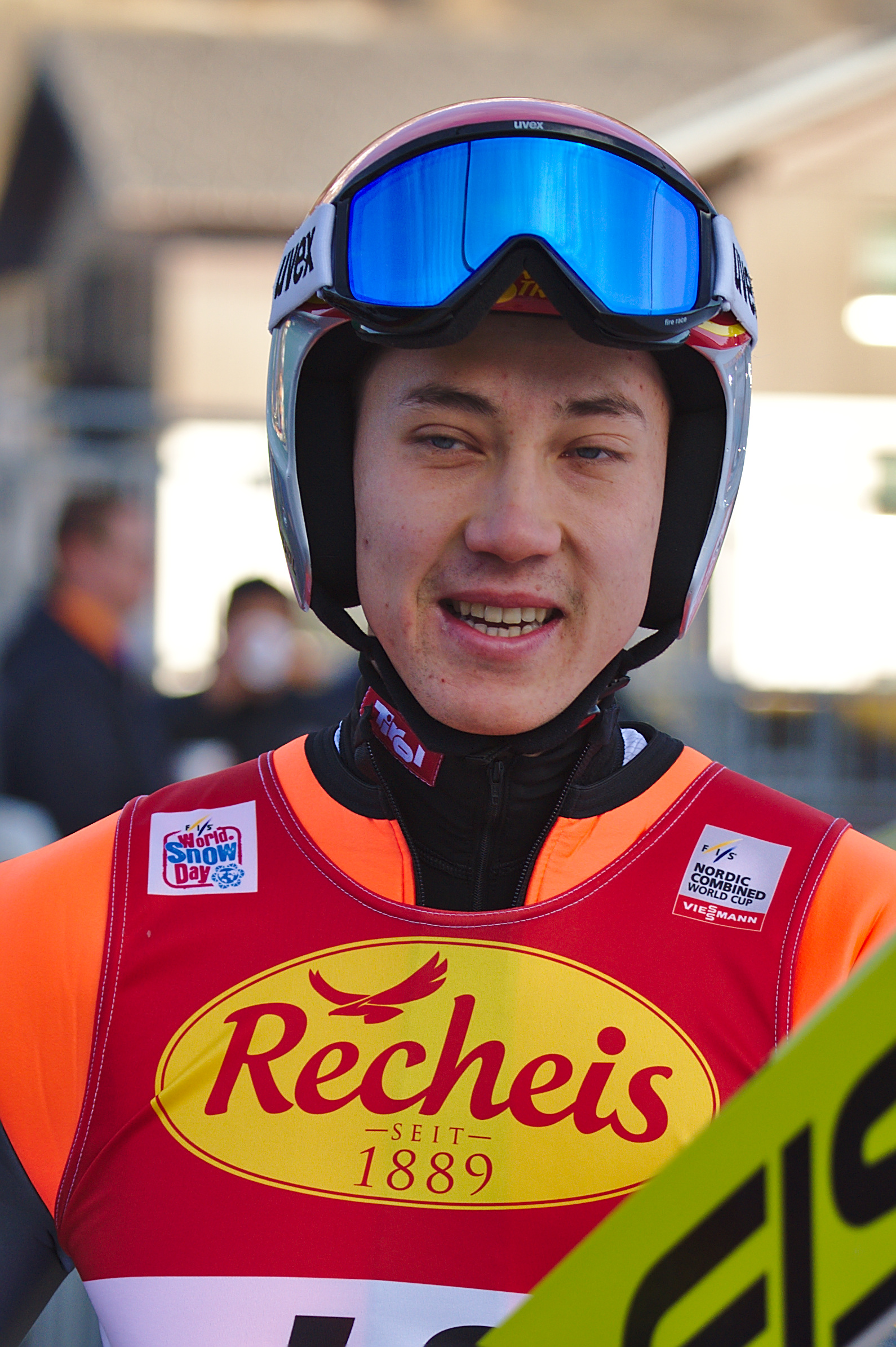 FIS Worldcup Nordic Combined Ramsau 2016. Bild zeigt Mario Seidl (AUT)